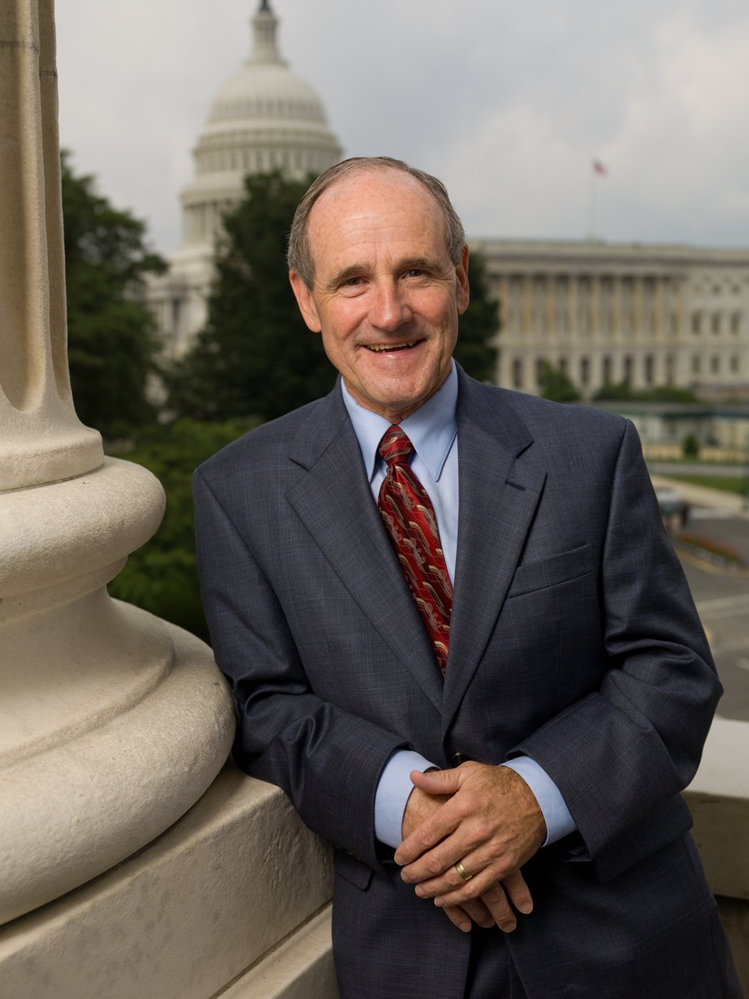 Sen. Jim Risch (R-ID)